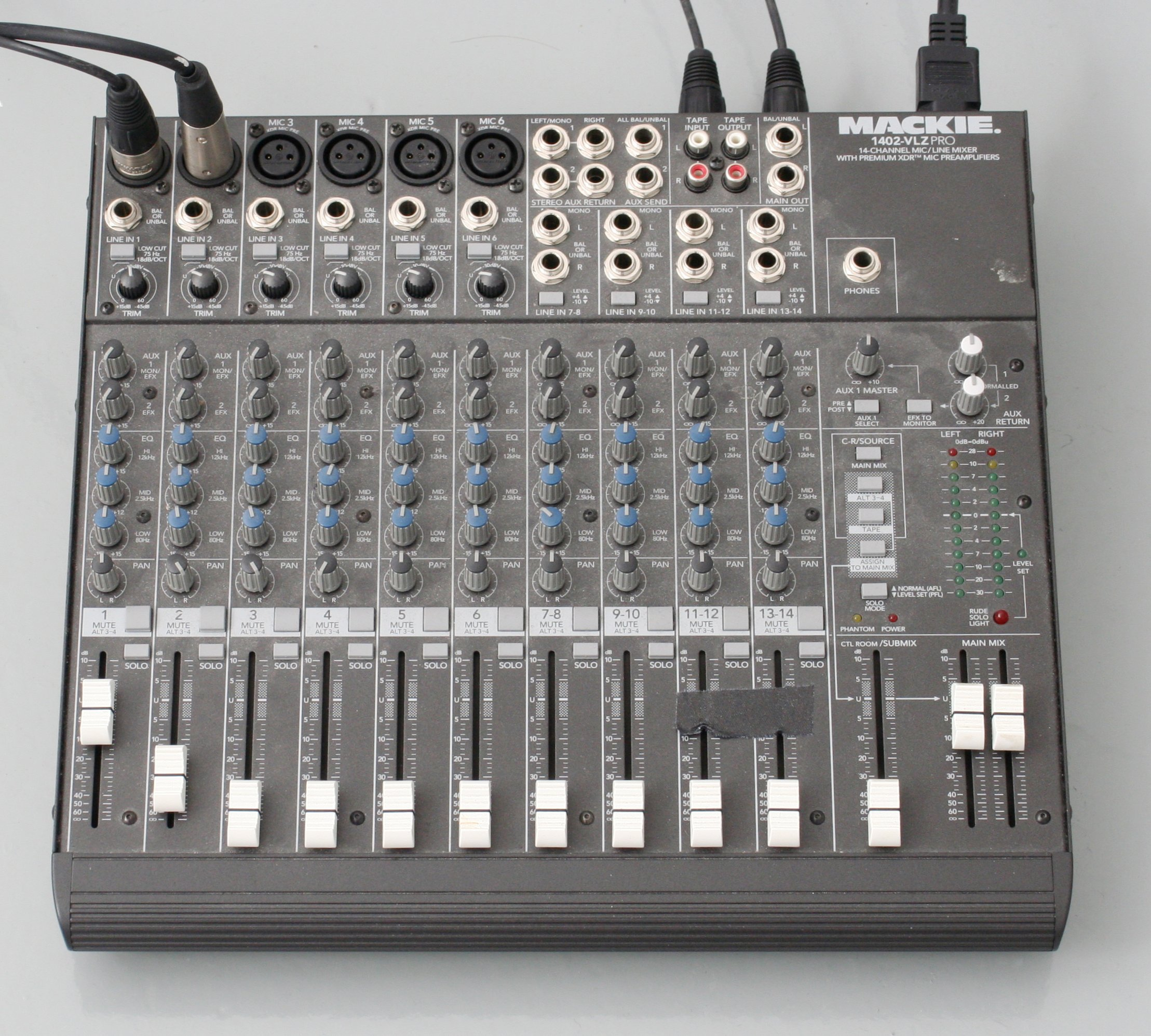 Mackie 1402-VLZ Pro compact audio mixer.